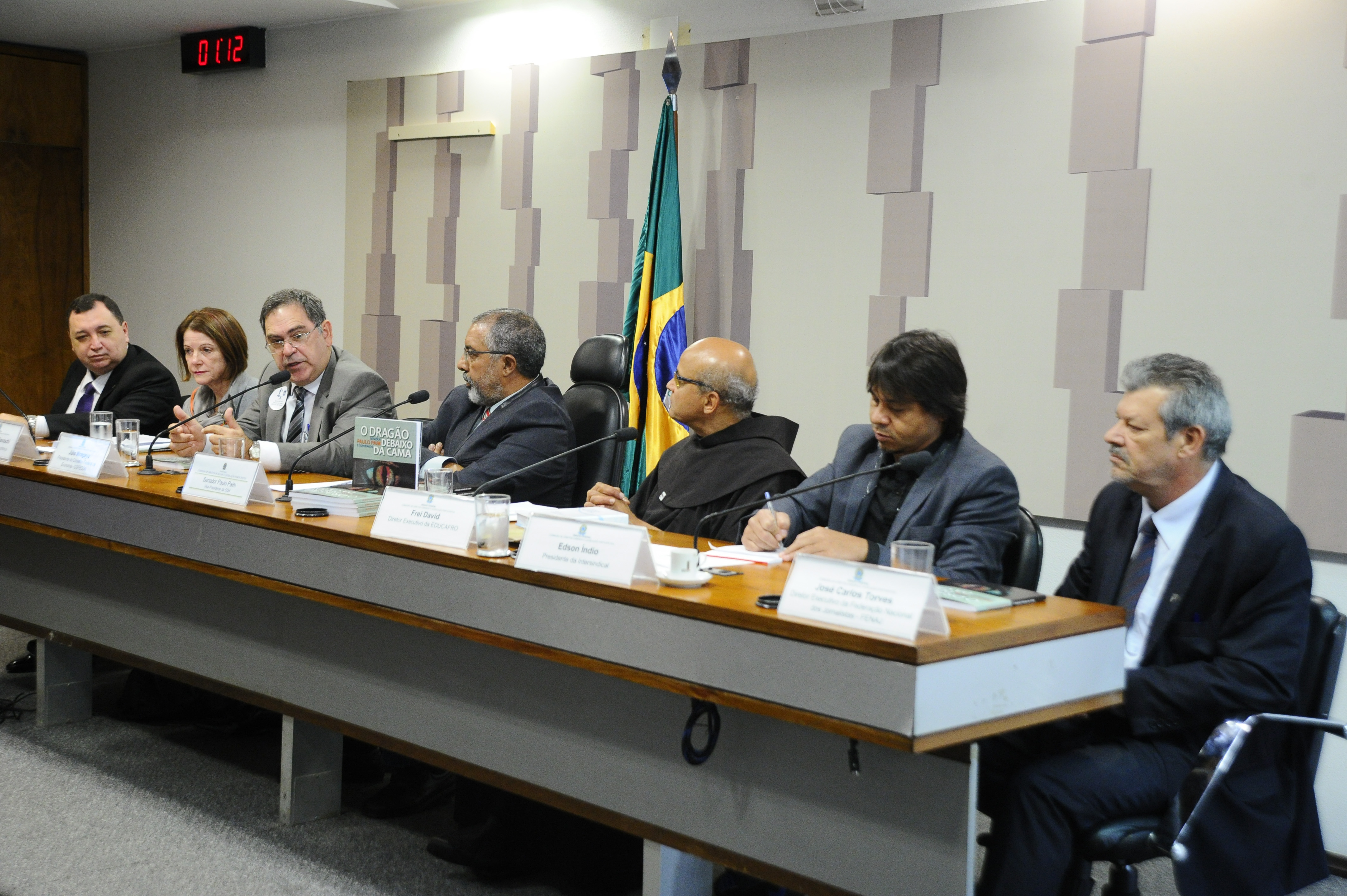 Comissão de Direitos Humanos e Legislação Participativa (CDH) realiza audiência pública interativa para debater sobre: "As reformas Previdenciária e Trabalhista", com lançamento do livro 'O dragão debaixo da cama – Impacto das reformas na vida dos brasileiros', de autoria do senador Paulo Paim. Mesa (E/D): presidente da Associação Nacional dos Magistrados da Justiça do Trabalho (Anamatra), Germano Silveira de Siqueira; representante do Fórum contra a Terceirização, Magda Barros Biavaschi; presidente do Conselho Federal de Economia (Cofecon), Júlio Miragaya; vice-presidente da CDH, senador Paulo Paim (PT-RS); diretor executivo da Educafro, Frei David; presidente da Intersindical, Edson Índio; diretor executivo da Federação Nacional dos Jornalistas (Fenaj), José Carlos Torves Foto: Geraldo Magela/Agência Senado